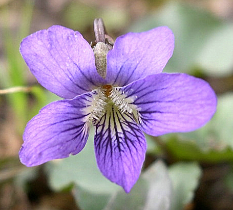 March 20, 2011